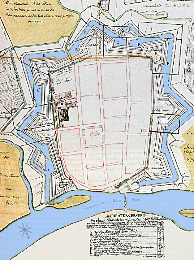 Festung und Stadt Rinteln, Gewässer nachkoloriert